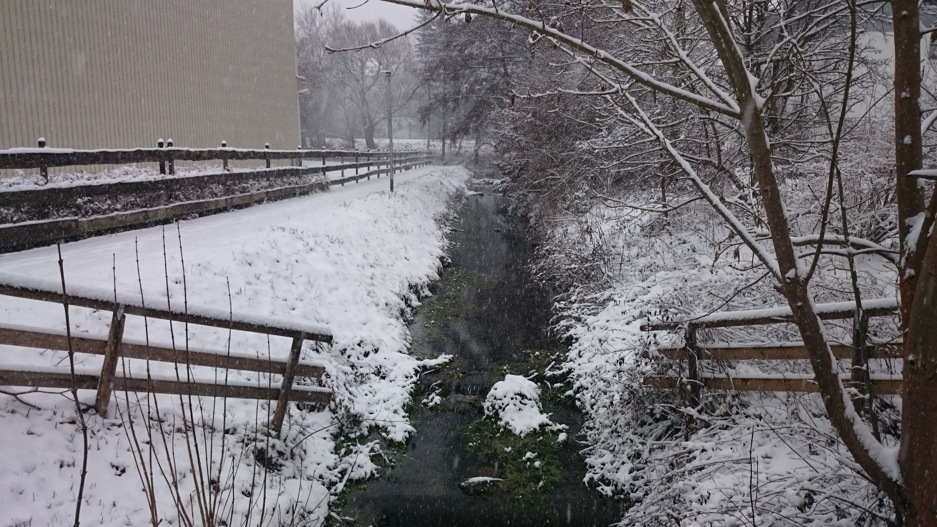 Der Pflusterbach, der Abfluss der Goldquelle in Mergelstetten